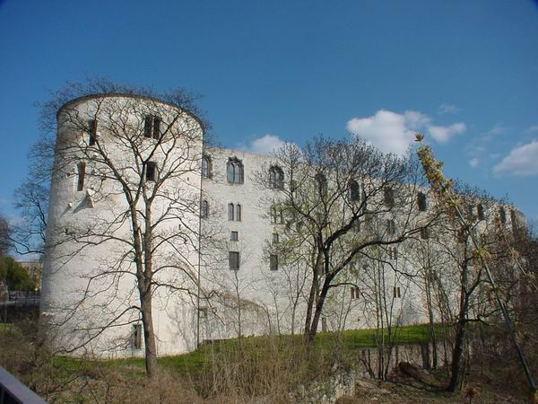 Halle Moritzburg, Westruine, eigenes Foto von 2004, public domain Mewes